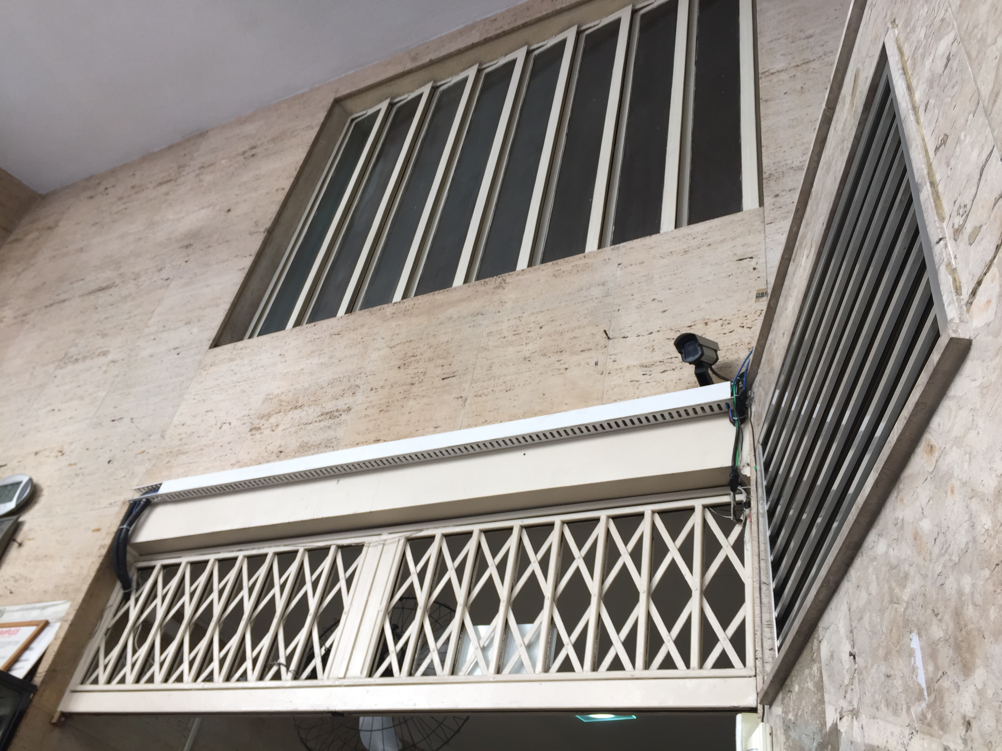 Detalhe interior do Edifício Banco Paulista do Comércio, em São Paulo (SP), Brasil